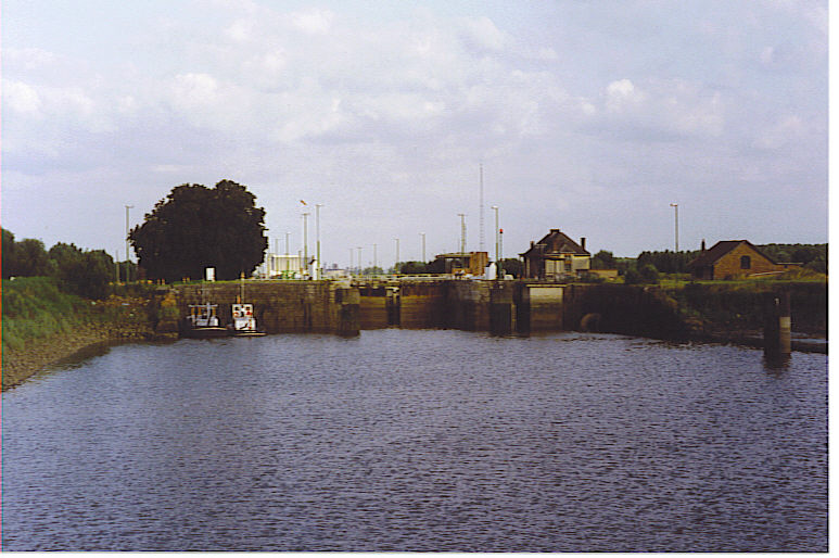 Sluis Wintam